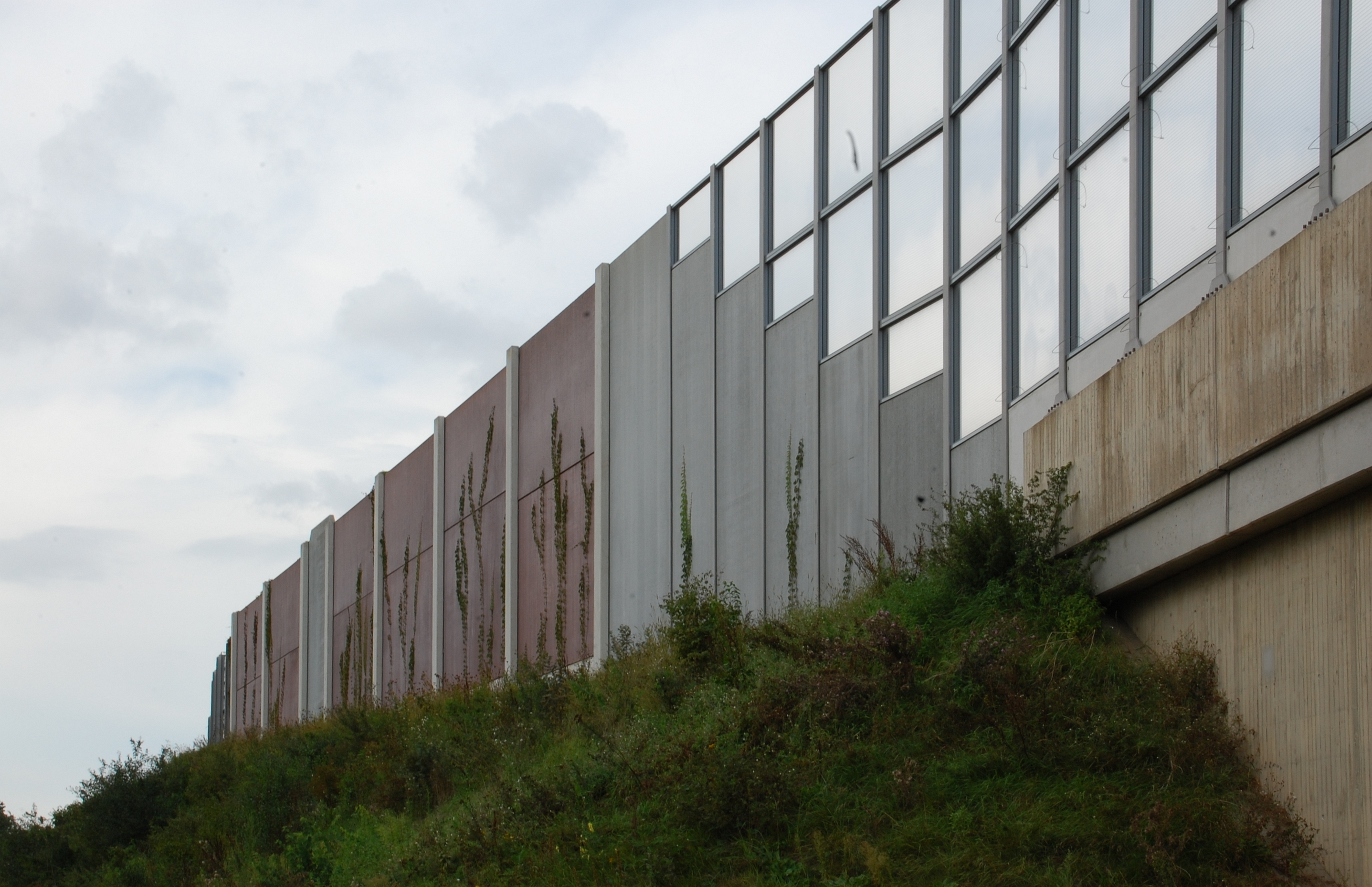 Autobahnbrücke der A 4 mit Lärmschutzwand in Horrem, Kerpen